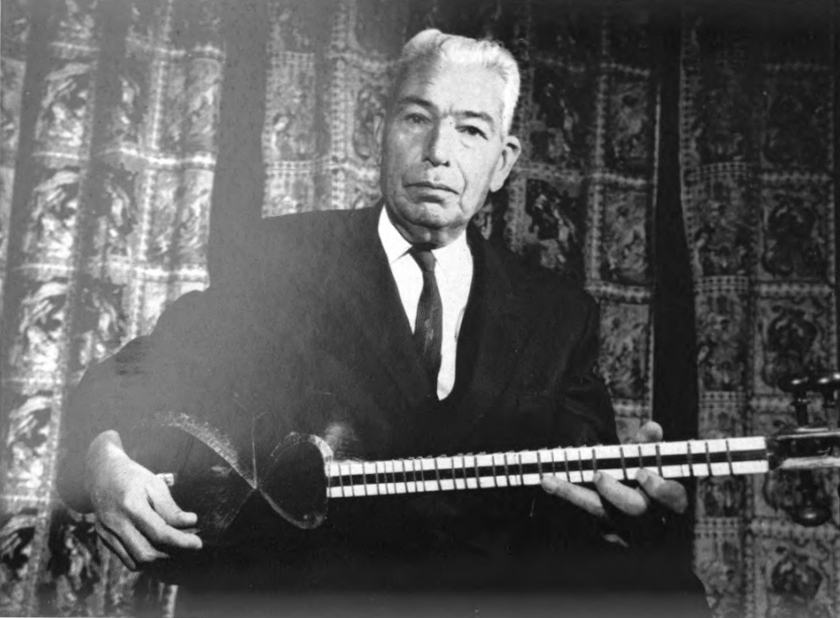 Portrait of subject